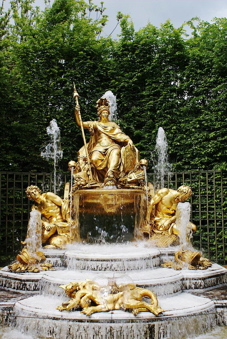 Bosquet de l'Arc de Triomphe - Petit Parc du Château de Versailles Removed watermark: Jérémy Flavien Hubert